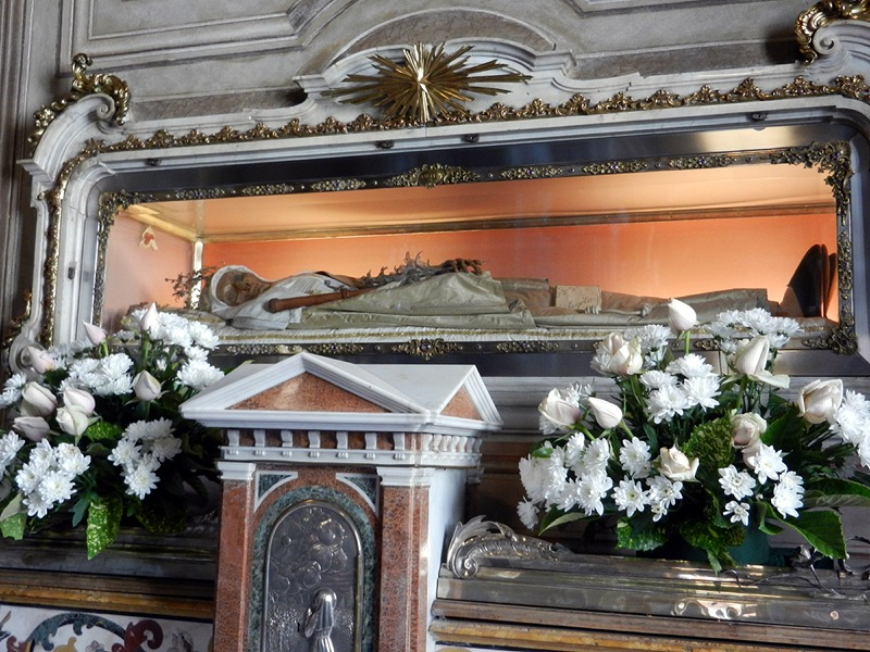 Brescia - Urna con le spoglie di S. Angela Merici nell'omonima chiesa